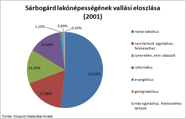 Sárbogárd város lakónépességének vallási eloszlása a 2001-es népszámlálási adatok szerint.